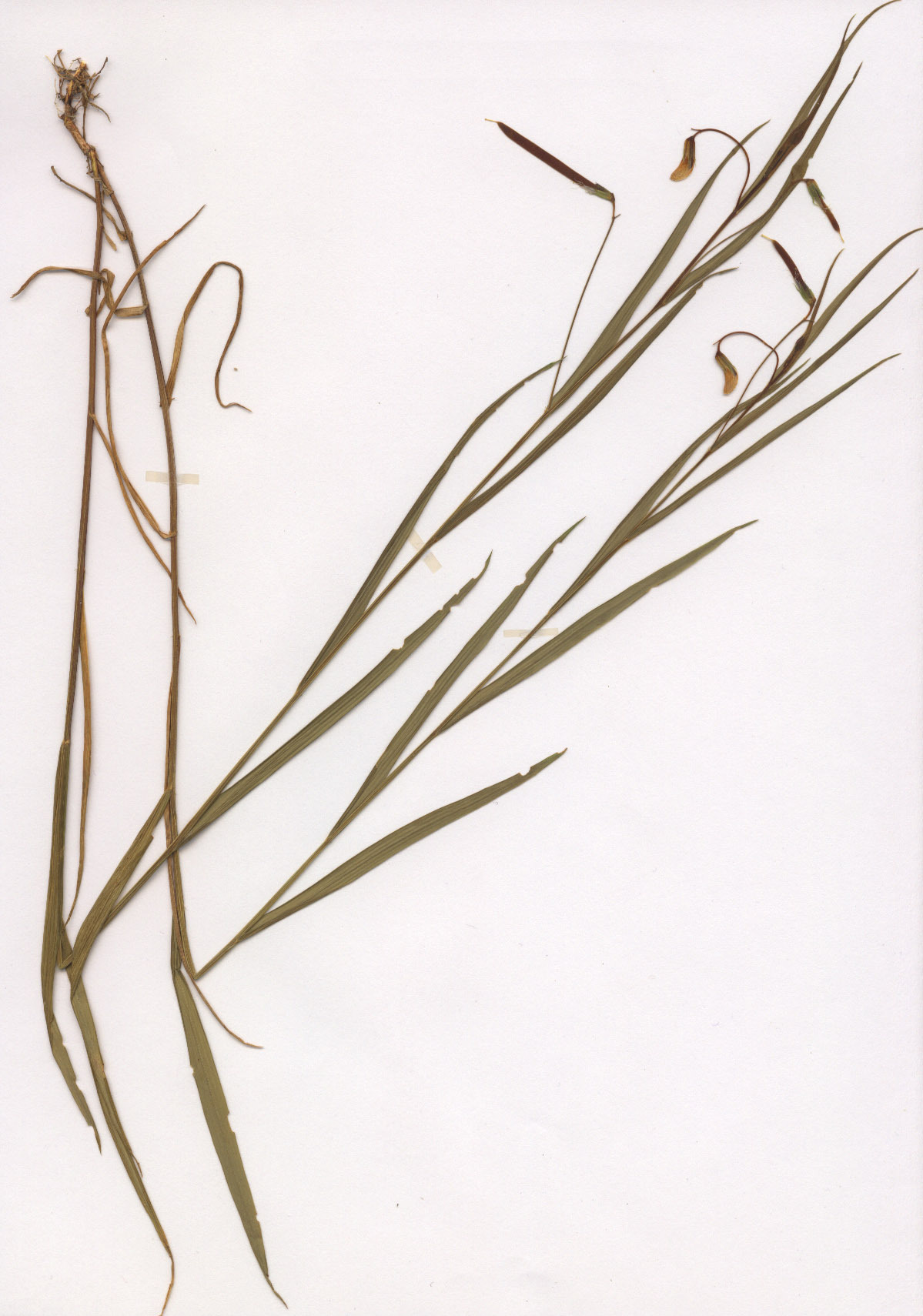 Lathyrus nissolia, eigener Herbarbeleg von 1982, Unterfranken